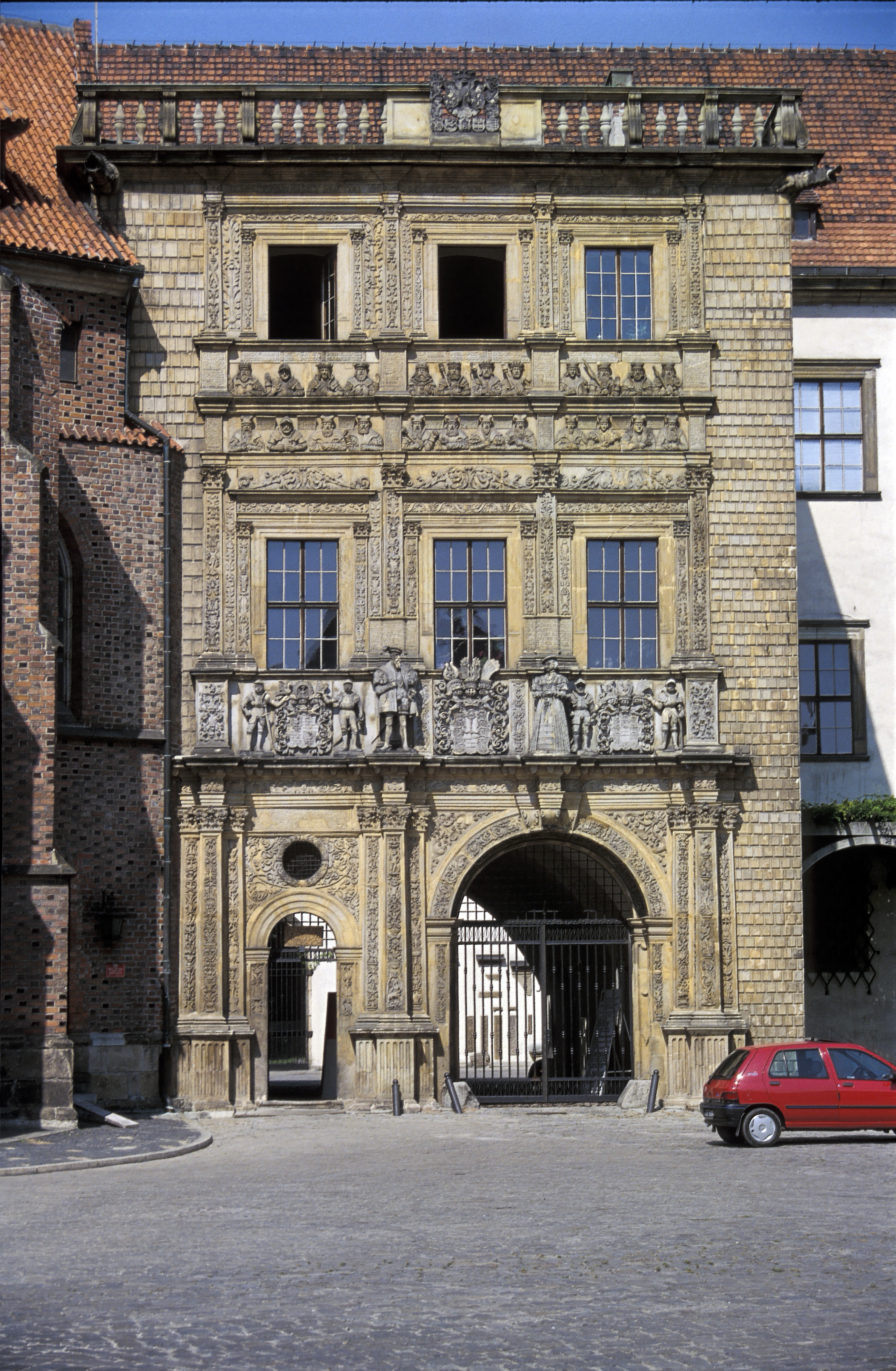 Poland, Brzeg Castle